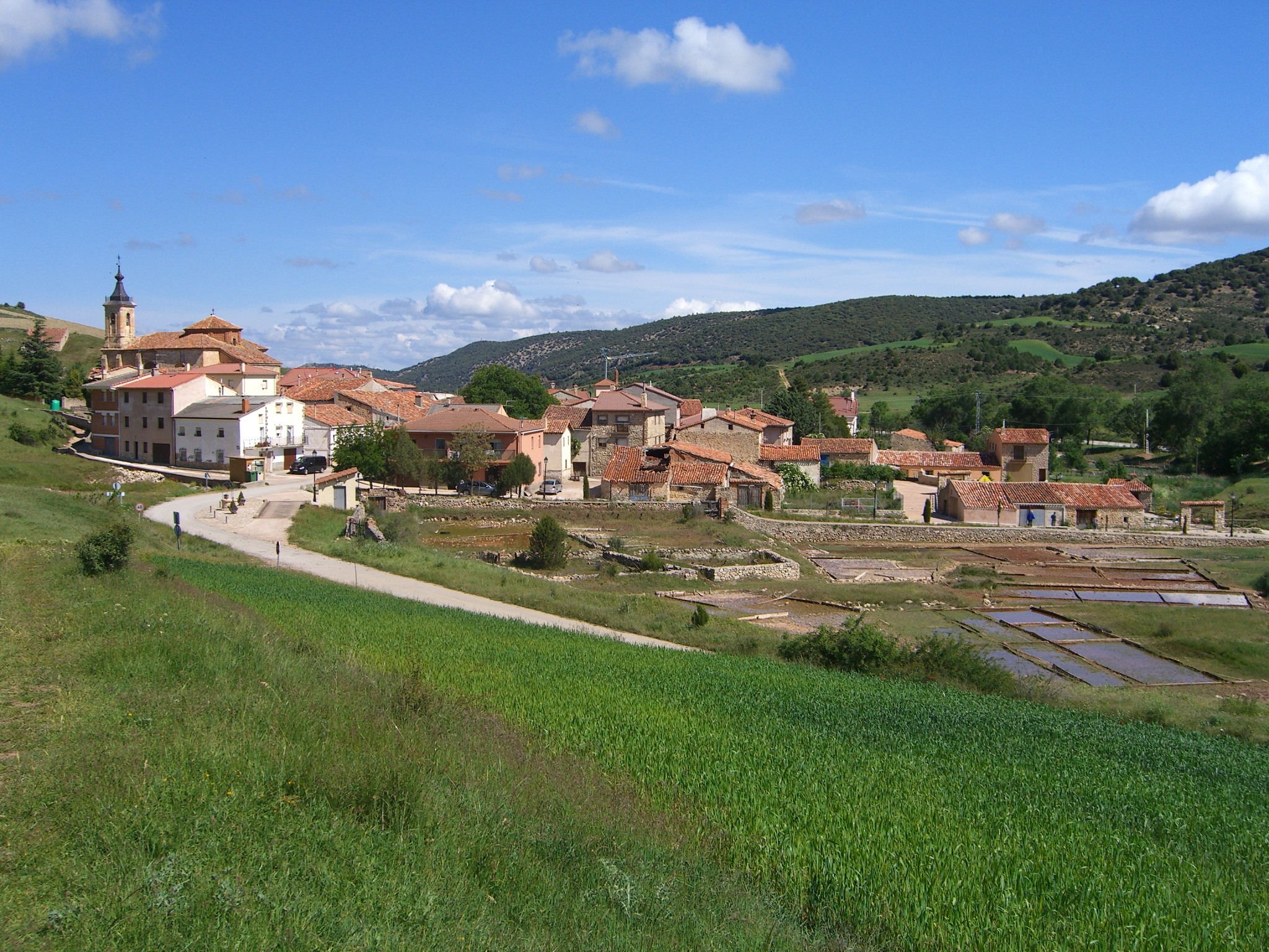 Vista de Terzaga desde la carretera